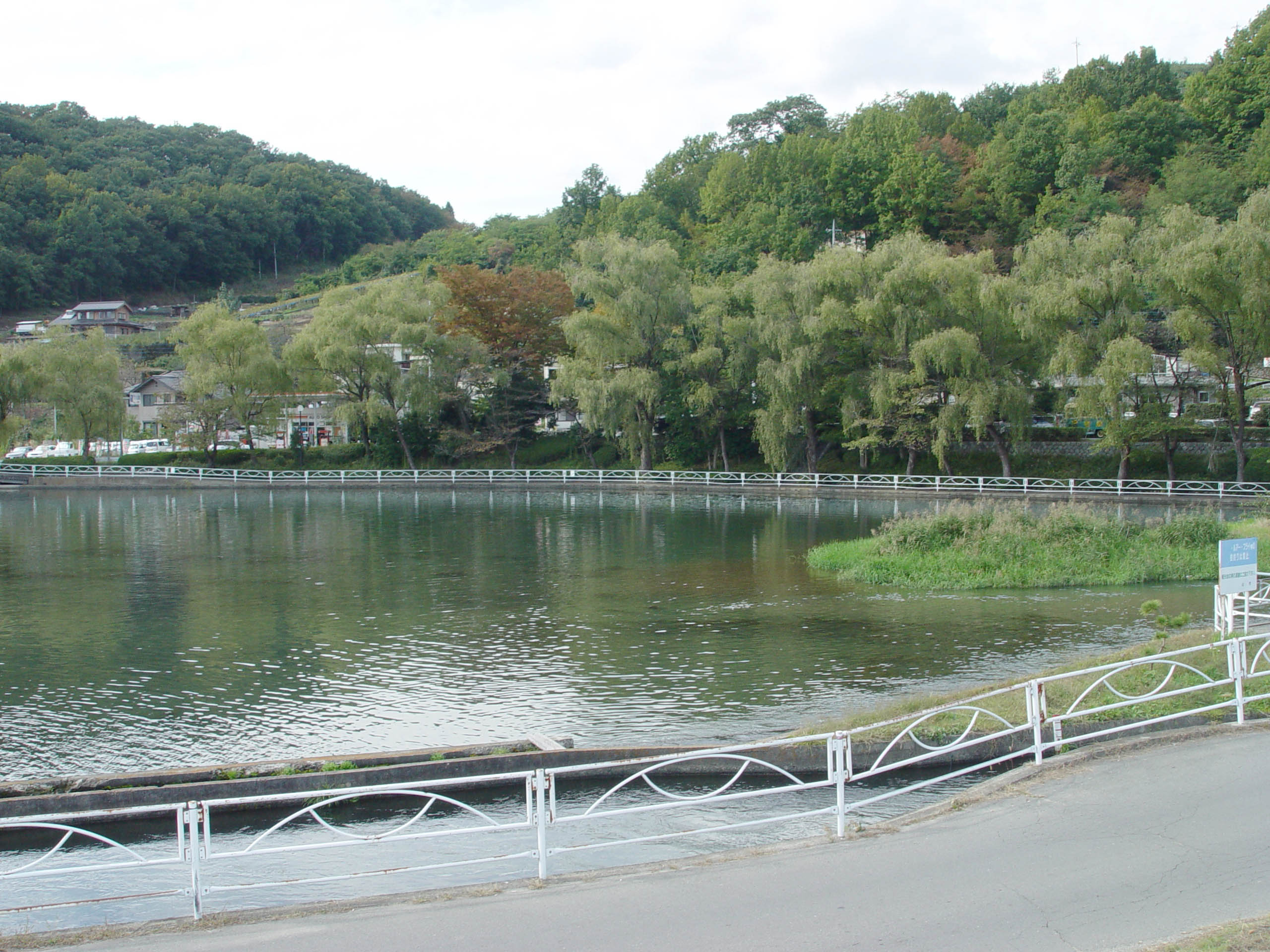 Manriki Park, Yamanashi, Yamanashi, Japan山梨市万力公園